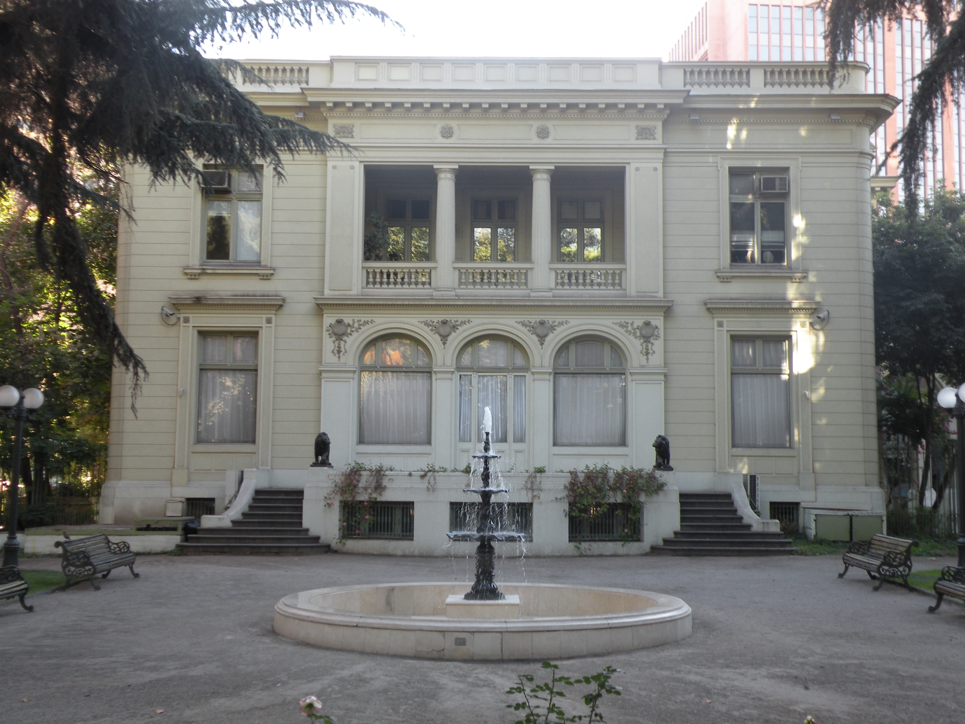 Palacio Schacht, actual Instituto Cultural de Providencia.